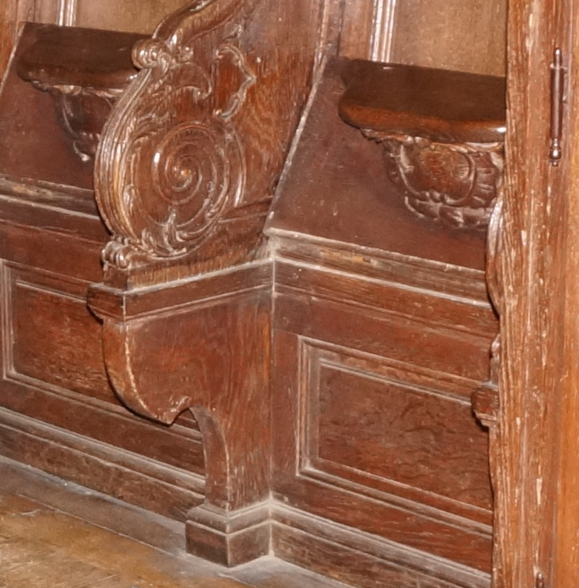 des stalles du choeur.